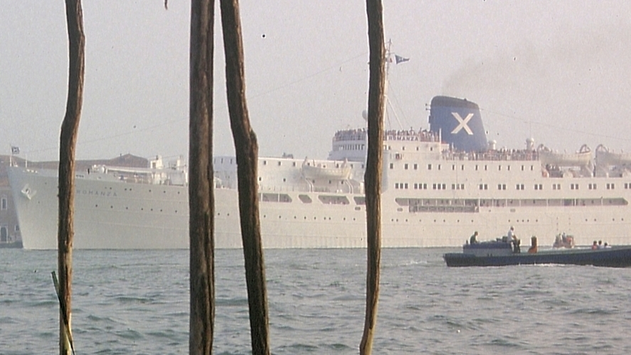 San Giorgio Maggiore (Venice)